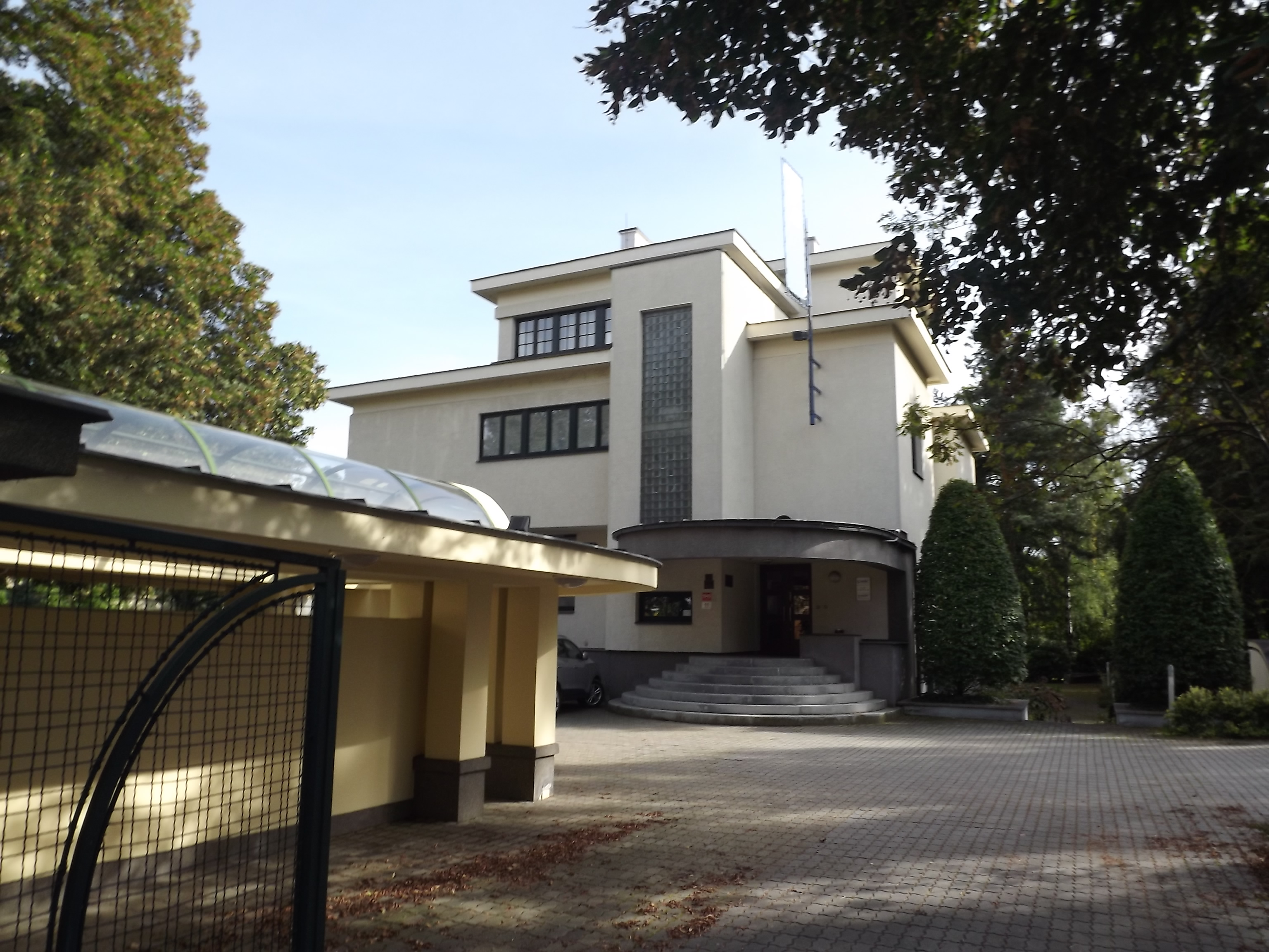 vila Zátkova, Husova třída 1845/11, České Budějovice